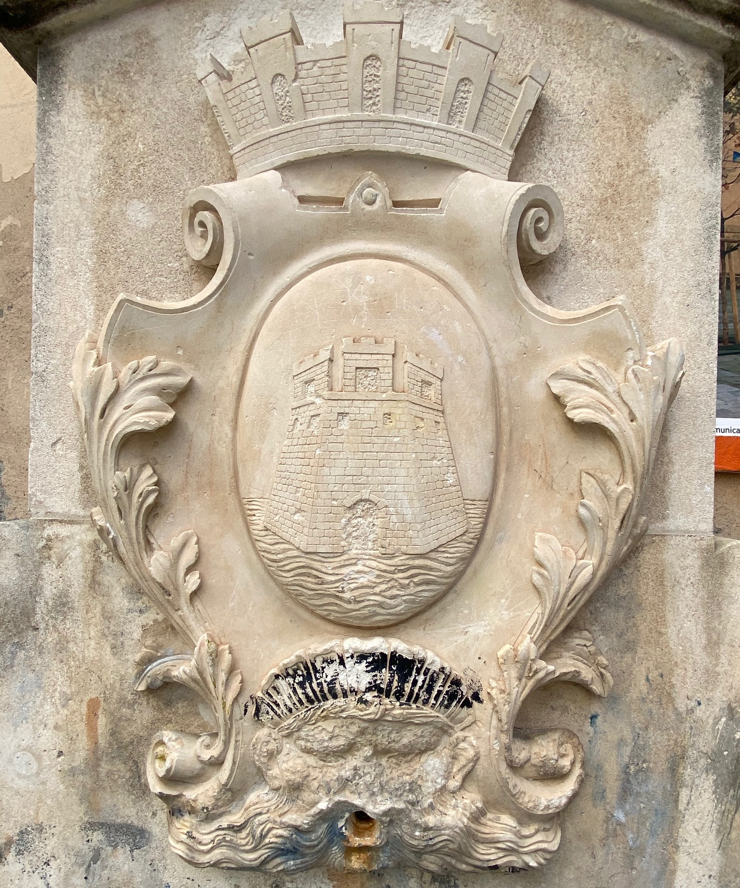 Corsu: U stemma di a cità di Bastia. Funtana di u Giardinè, piazza Guasco, in a Citatella